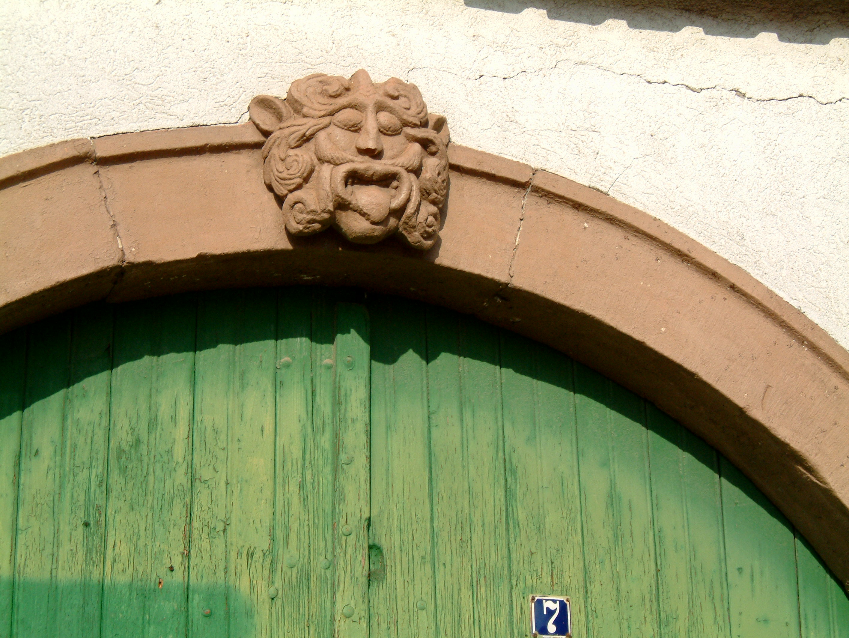 Neidkopf am Torbogen: Franz Roth Domels Haus, Metzgergasse 7, Dirmstein